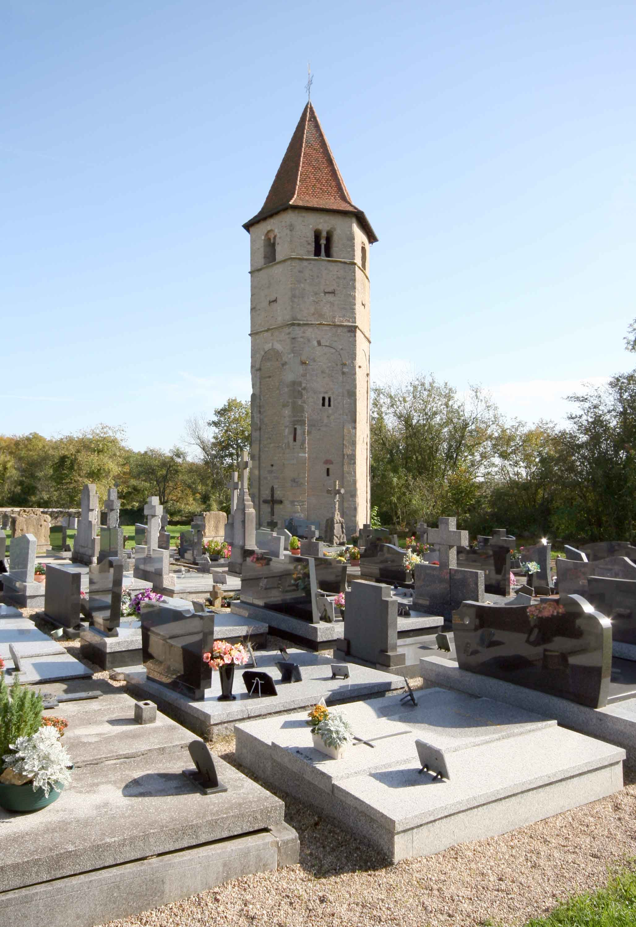 Usselskirch.